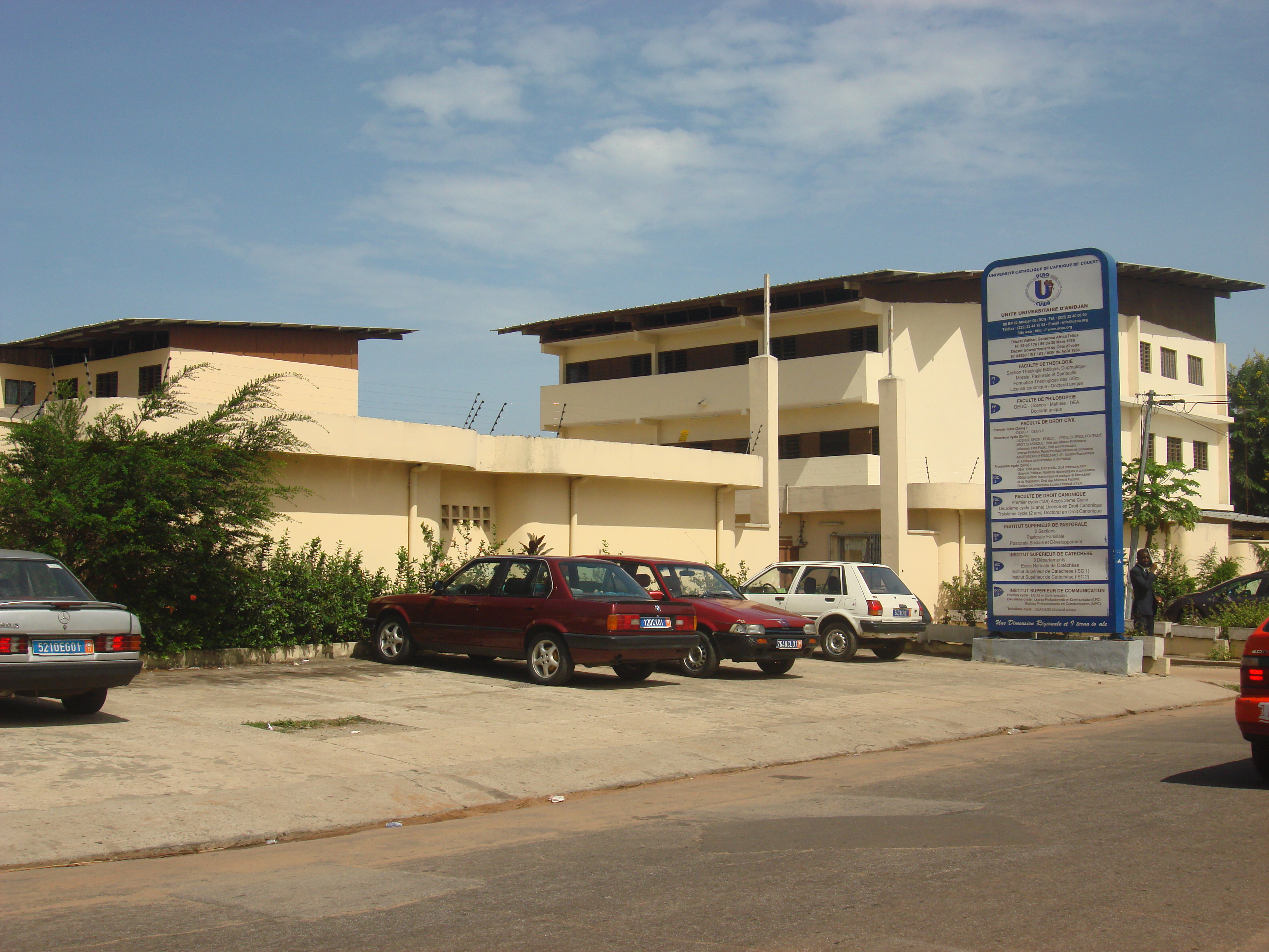 Université catholique de l'Afrique de l'ouest à Cocody, Abidjan (Côte d'Ivoire)